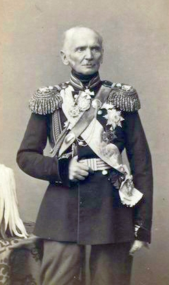 Сухозанет, Николай Онуфриевич